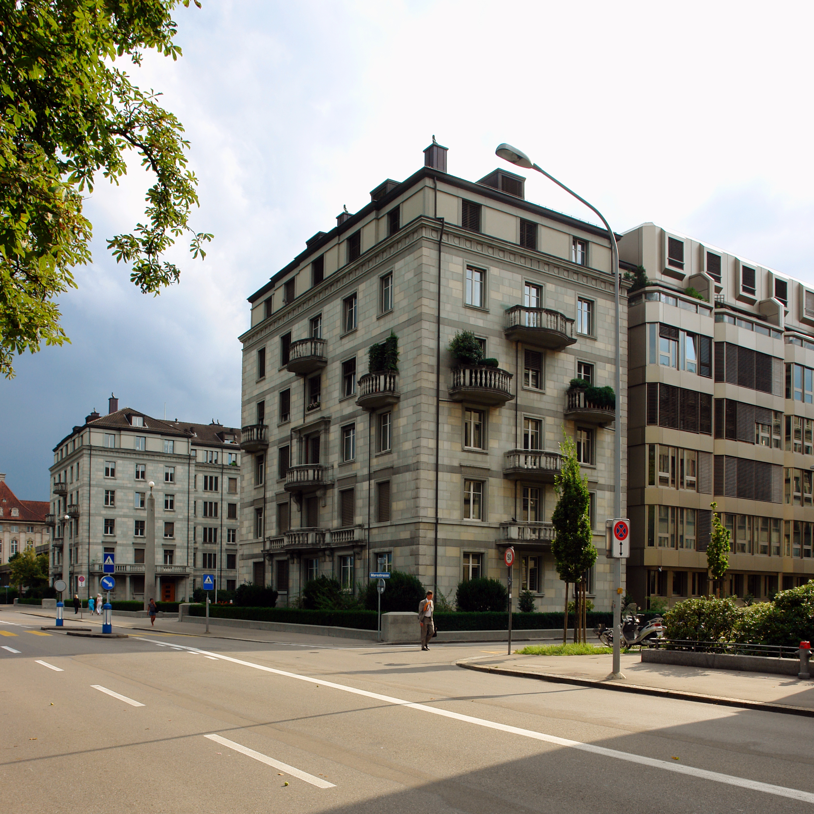 Altbau der Schweizer Rückversicherung, Blick von Nordost, Baujahr: 1911-13, Architekt: Alexander von Senger mit Emil Faesch